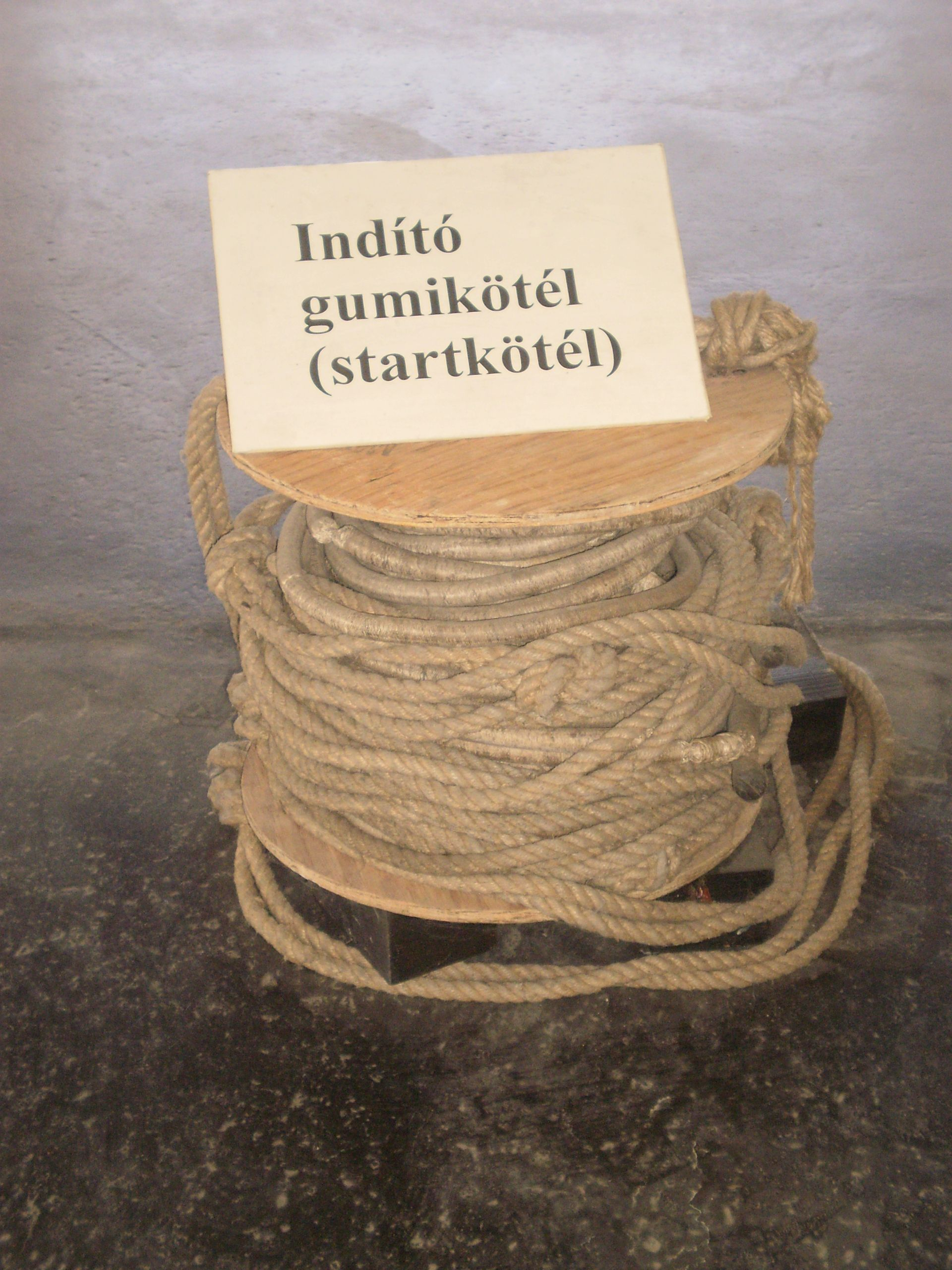 Vitorlázó repülőgépek indítására szolgáló gumikötél a Közlekedési Múzeumban